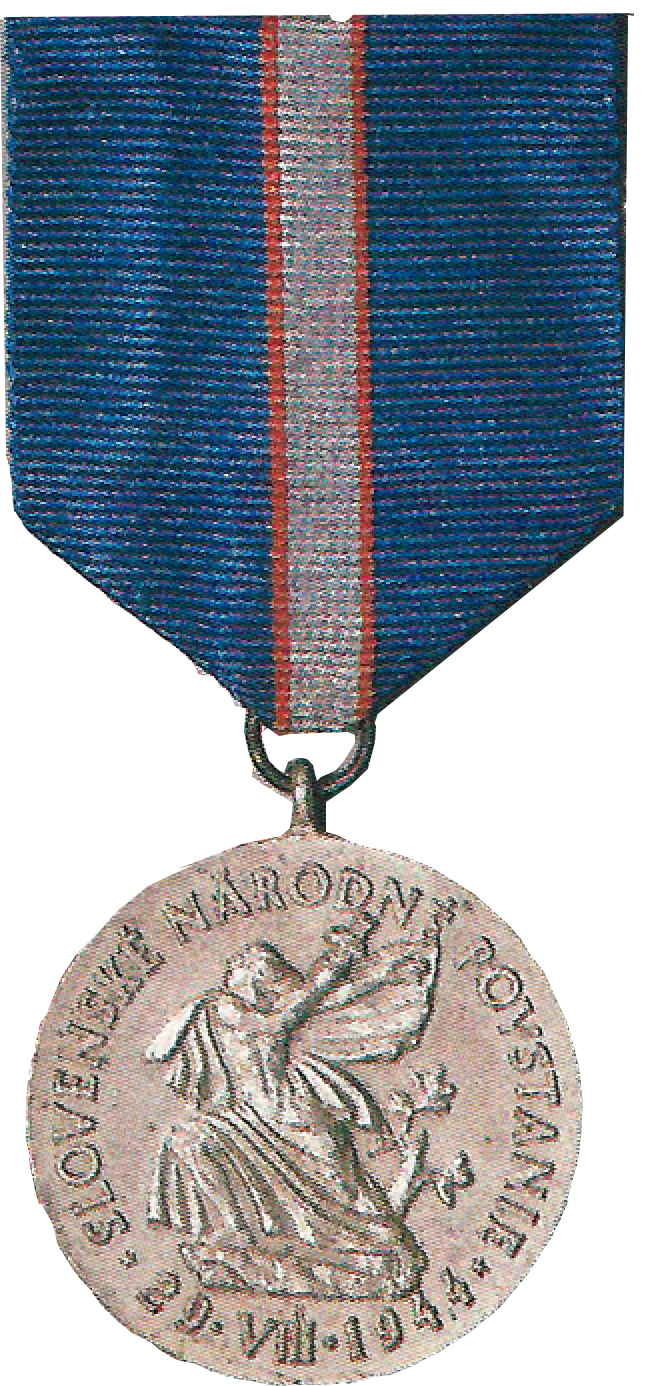 Rad Slovenského národného povstania 2. triedy